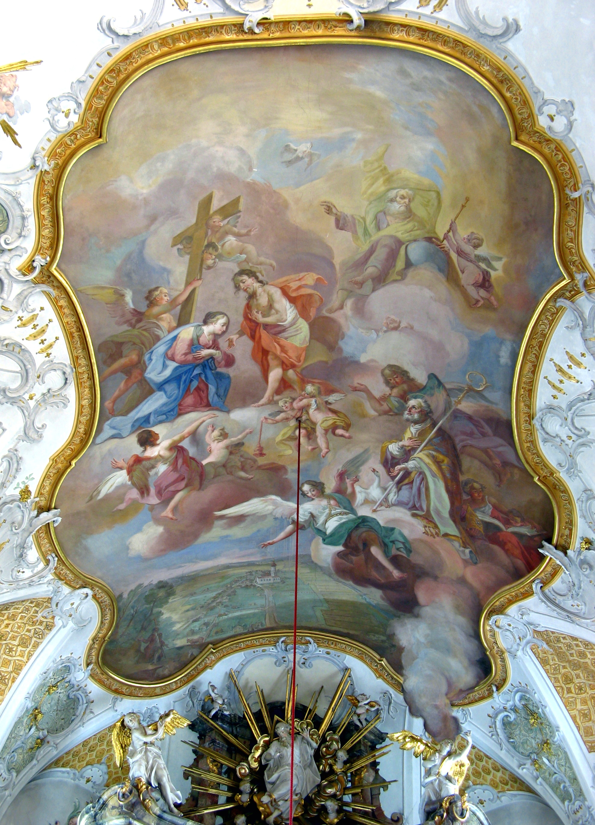 Chorfresko von Franz Anton Zeiller in der Kirche von Schlingen, 1763